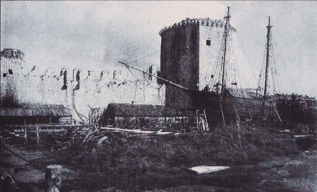 Фортеця Камерленґо